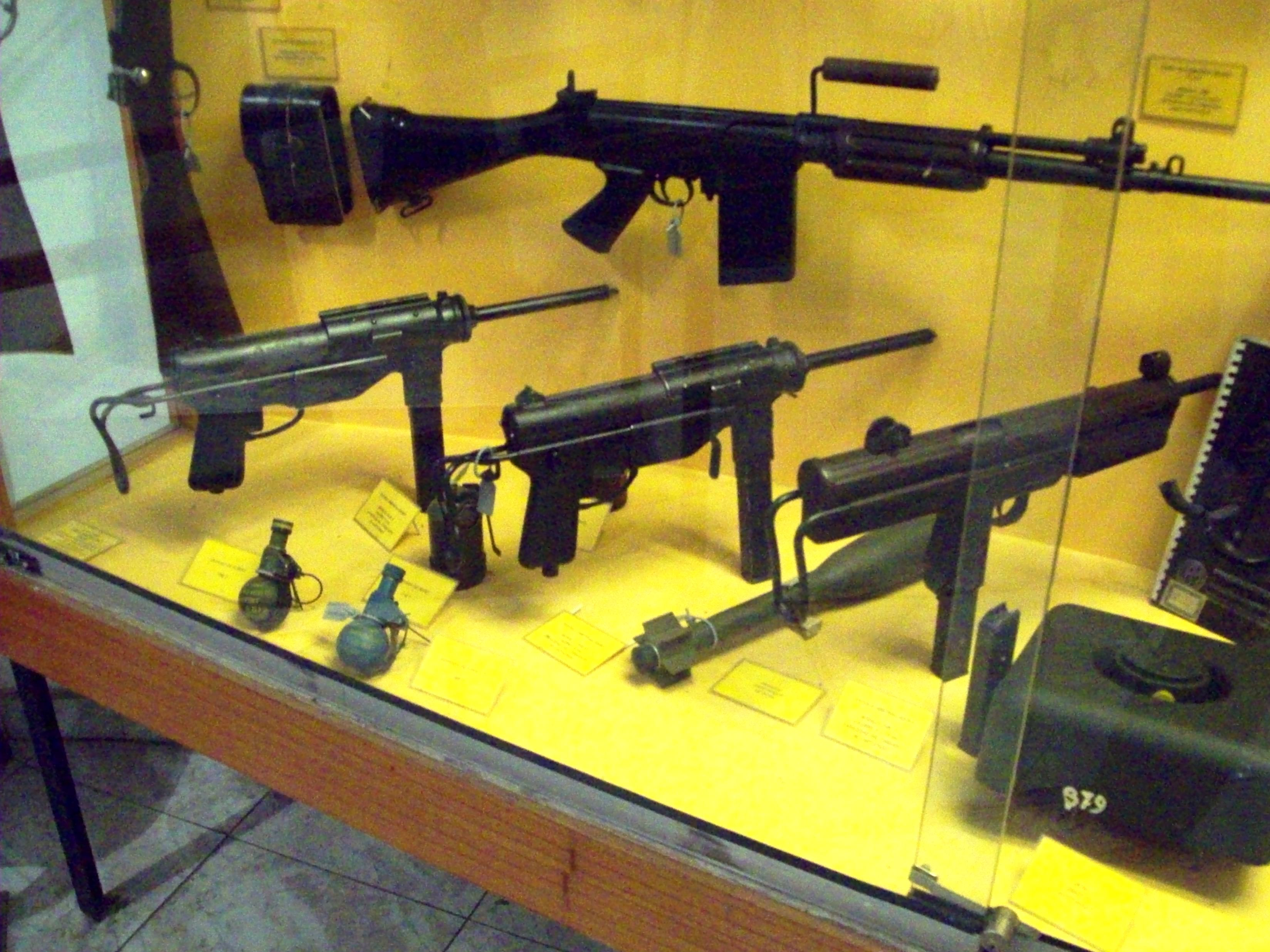 Armamento expuesto en el Museo de Armas de la Nación, ciudad de Buenos Aires, Argentina 2014.